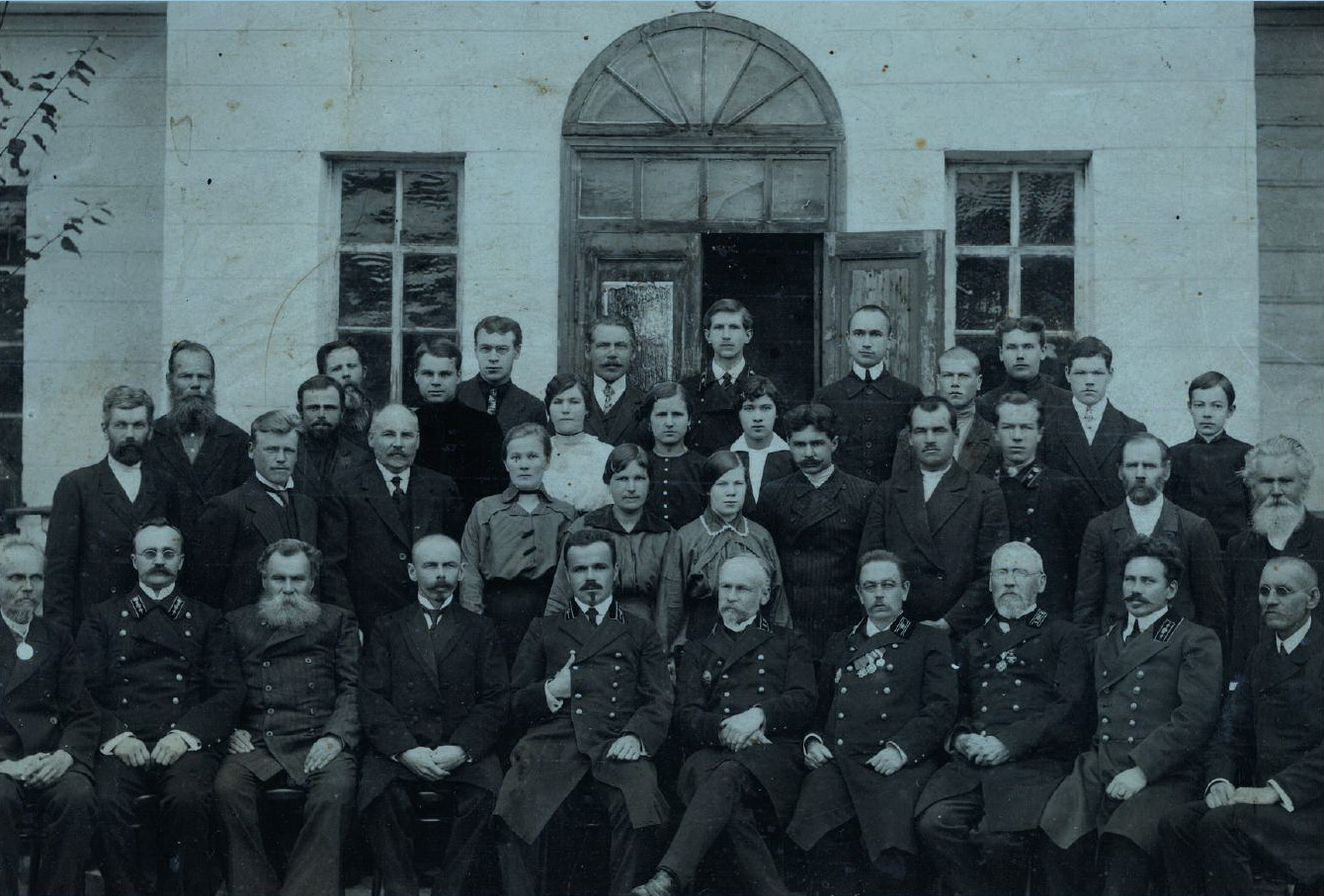 Заводоуправление Каменского завода, 1914